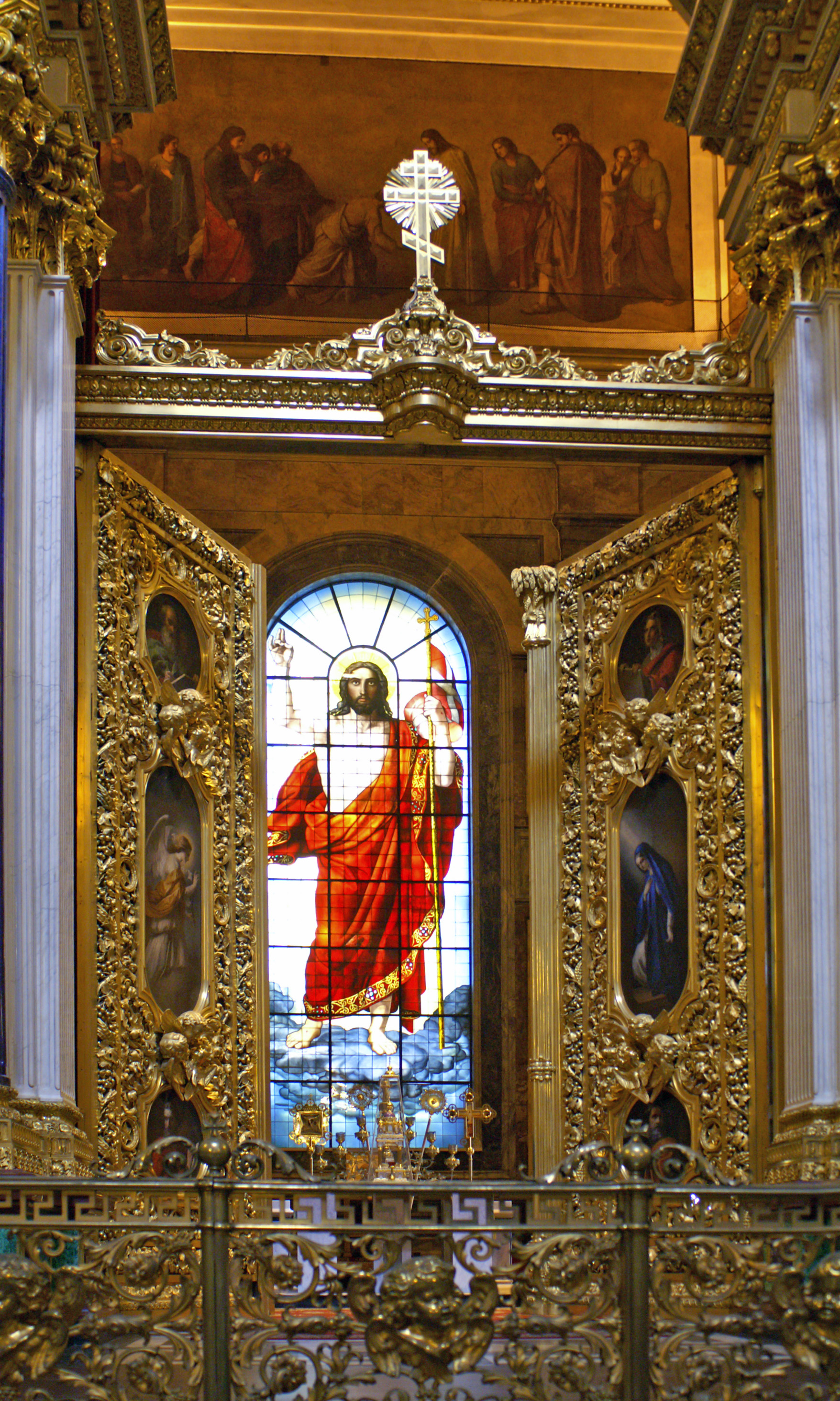 Sankt Petersburg. Isaakskathedrale